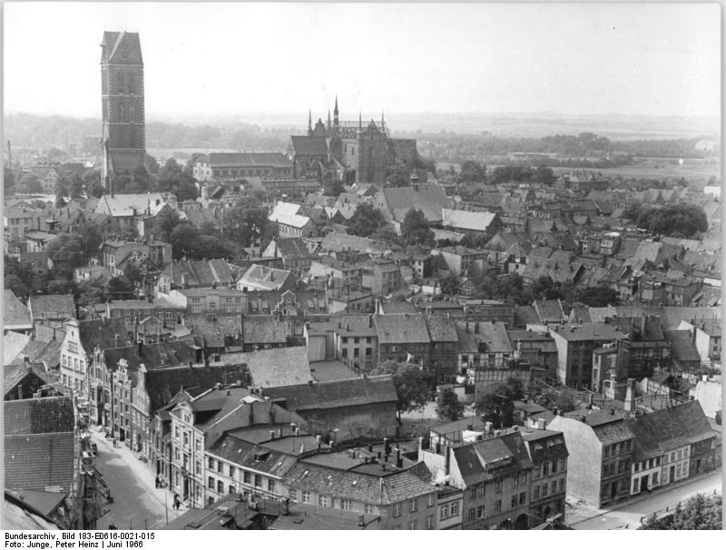 Wismar, Altstadt Zentralbild Junge 16.6.1966 Ostseebezirk Rostock: Werft- und Hafenstadt Wismar. Mittelalterliche Giebel, ein großer Marktplatz, Bauten der Gotik und Renaissance zeugen von der Bedeutung und Größe Wismars in der Hansezeit. Aber nicht das allein beeindruckt den Besucher, der nach Wismar kommt. Ihn nehmen vor allem der Hafen und die Mathias-Thesen-Werft gefangen, denn hier schlägt heute der Puls der Stadt. Zum Wahrzeichen der Stadt wurde nach dem 2. Weltkrieg die grosse Kabelkrananlge mit ihren Hellingen. Der Werft gegenüber liegen der Übersee-, der Öl- und Kalihafen. Die Schiffahrt verbindet Wismar mit den Staaten Afrikas und Asiens, mit der Sowjetunion und den Mittelmeerländern. UBz: Blick auf die Altstadt.